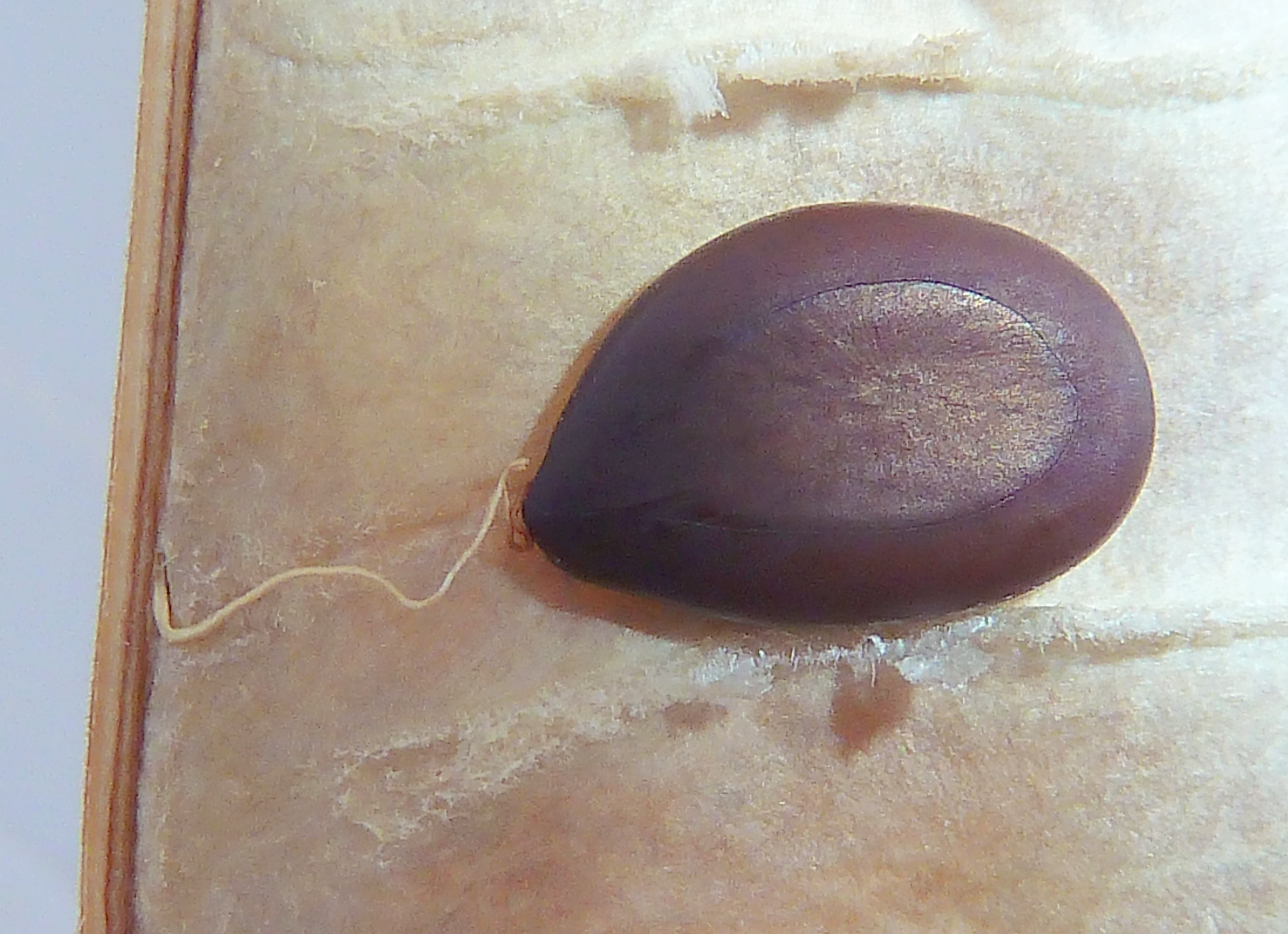 Leucaena leucocephala : Legumbre madura abierta con una semilla unida por su funículo a la placenta - Águilas (Murcia, España).